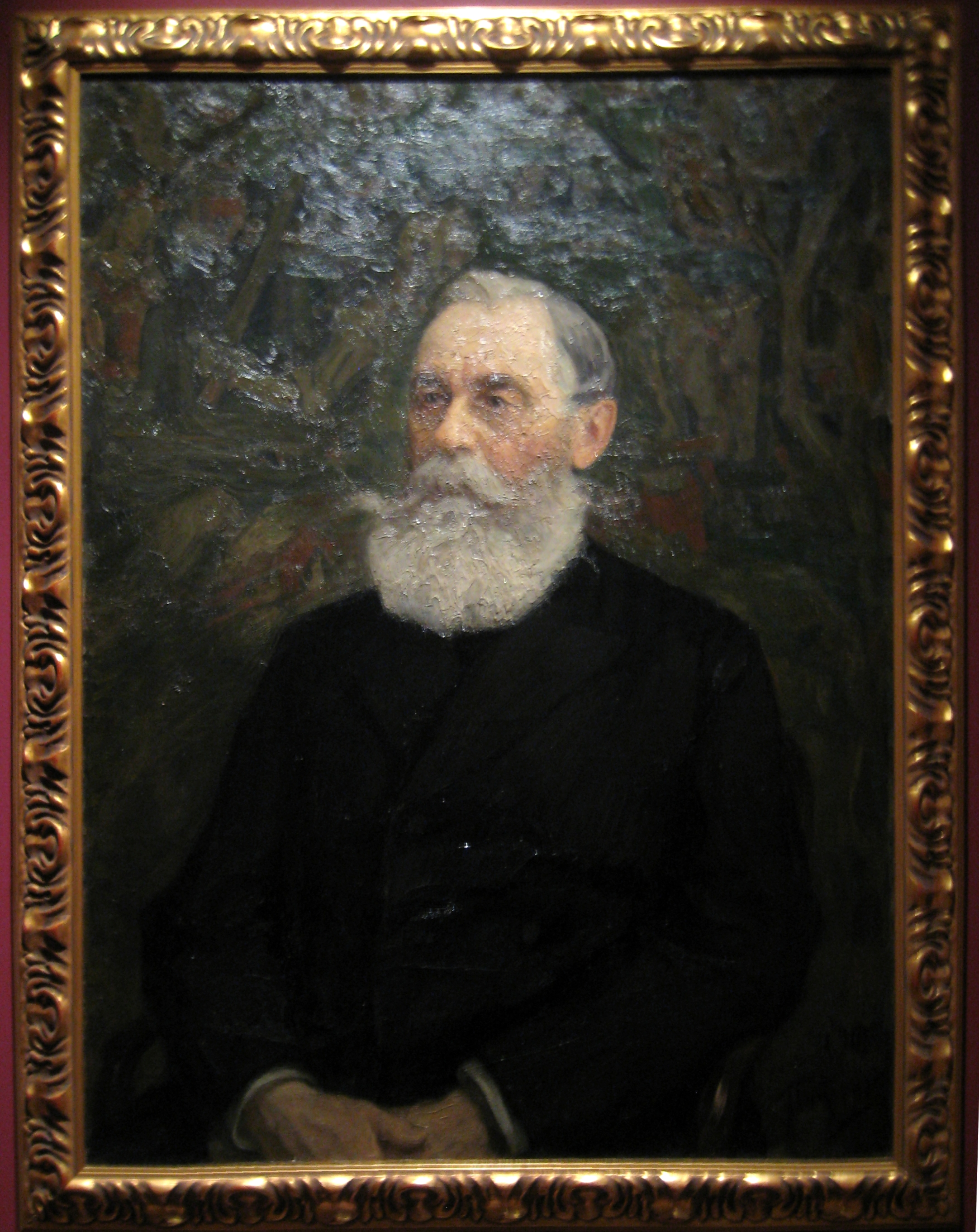 Б.Н. Чичерин. Портрет работы Л. Пастернака. 1905. ГИМ